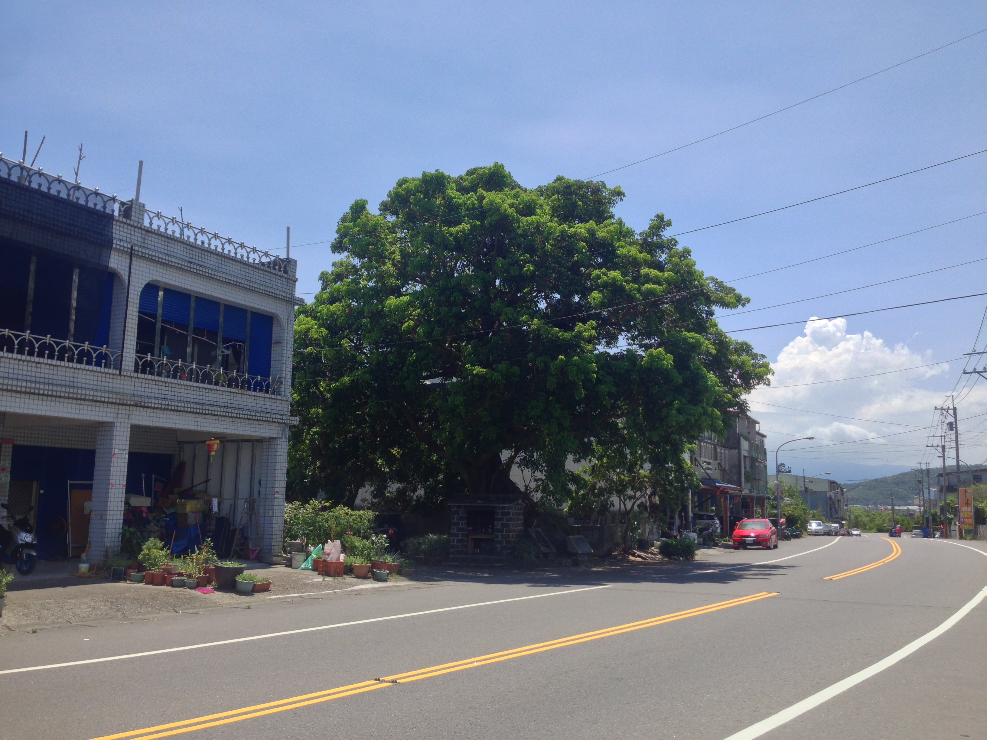 中文（台灣）: 員山結頭份大樹公